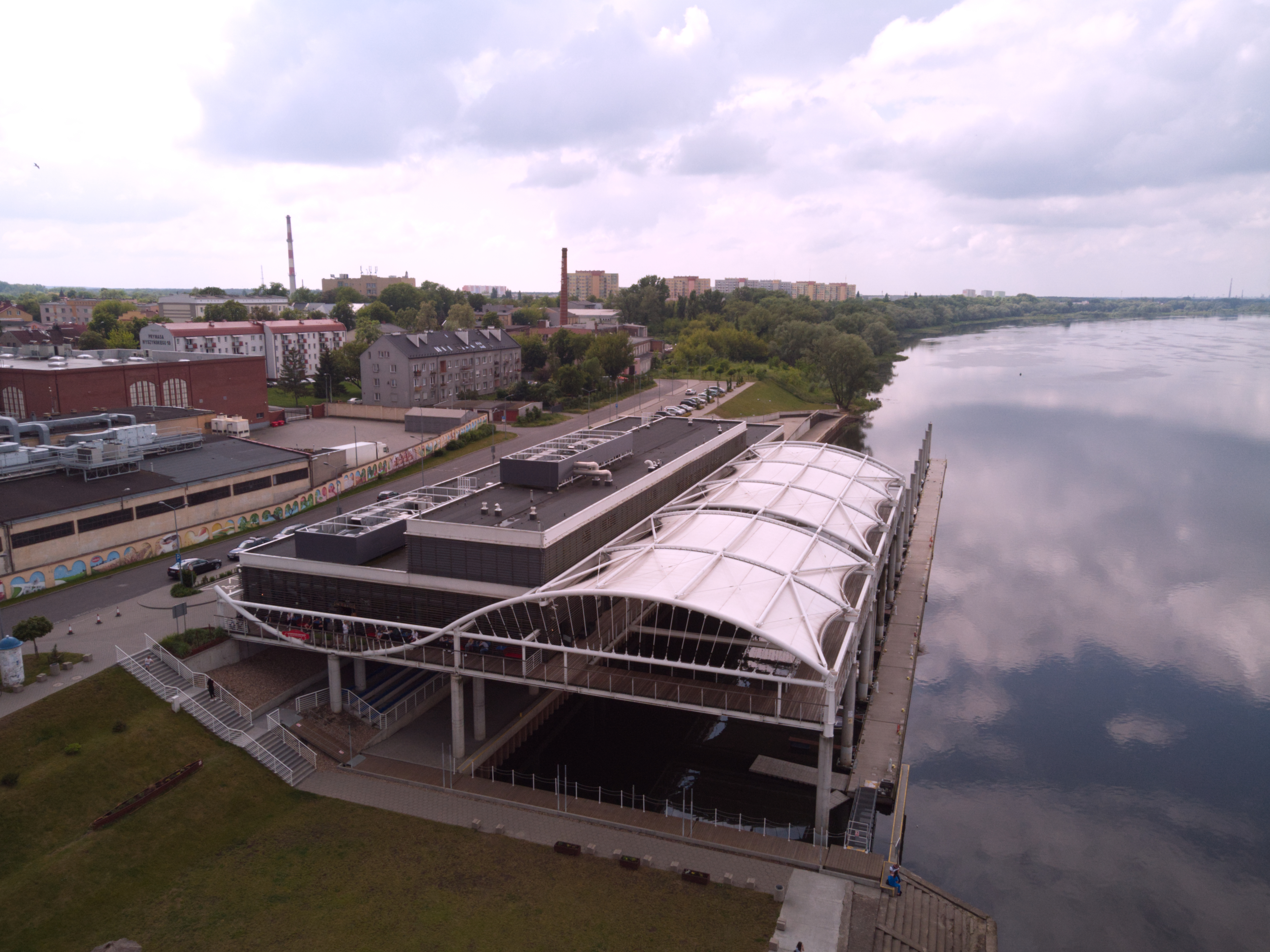 Przystań nad Wisłą (2020 r.)